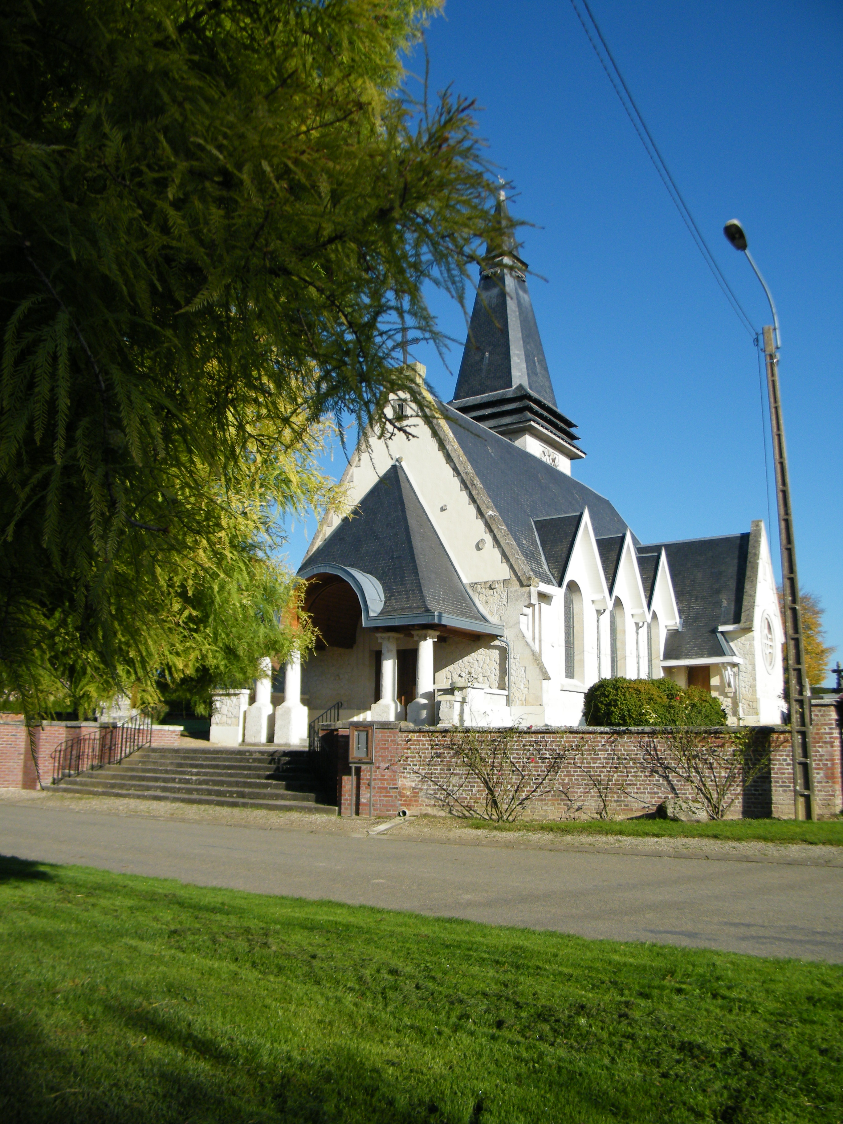 L'église.